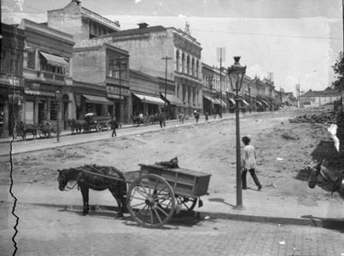 Avenida São João em 1915 em obras de alargamento, com vista para o edifício do Conservatório Dramático e Musical de São Paulo.